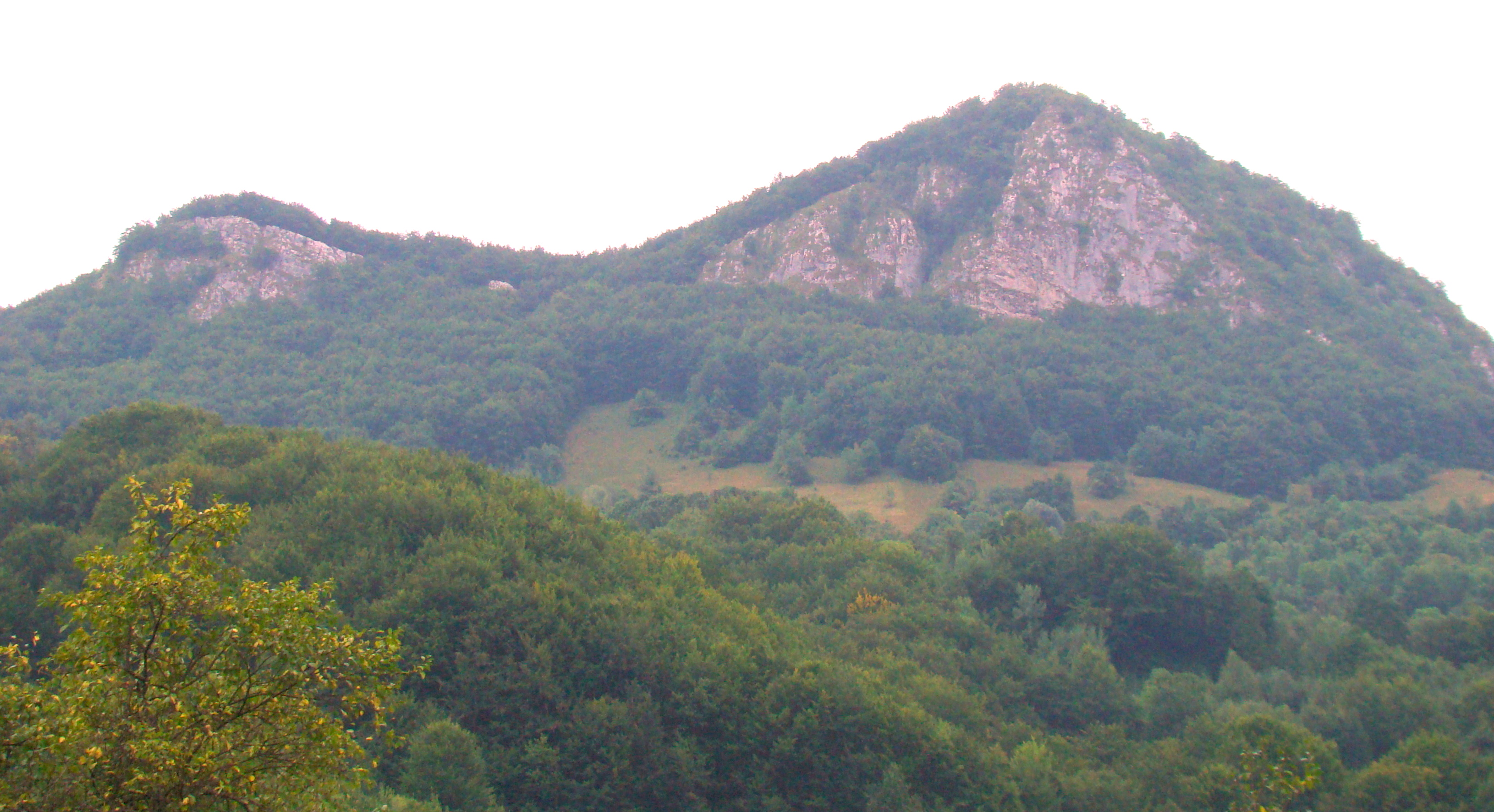 Biserica de lemn din Bulzeștii de Sus-Hunedoara